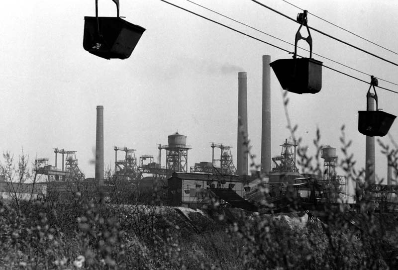 Tragseilbahn zwischen der Kokerei der Zeche Carolinenglück und den Hochöfen des Bochumer Vereins (Bildhintergrund) um 1968. Anmerkungen:Nach ausdrücklicher Genehmigung durch den Urheber hochgeladen von Cschirp